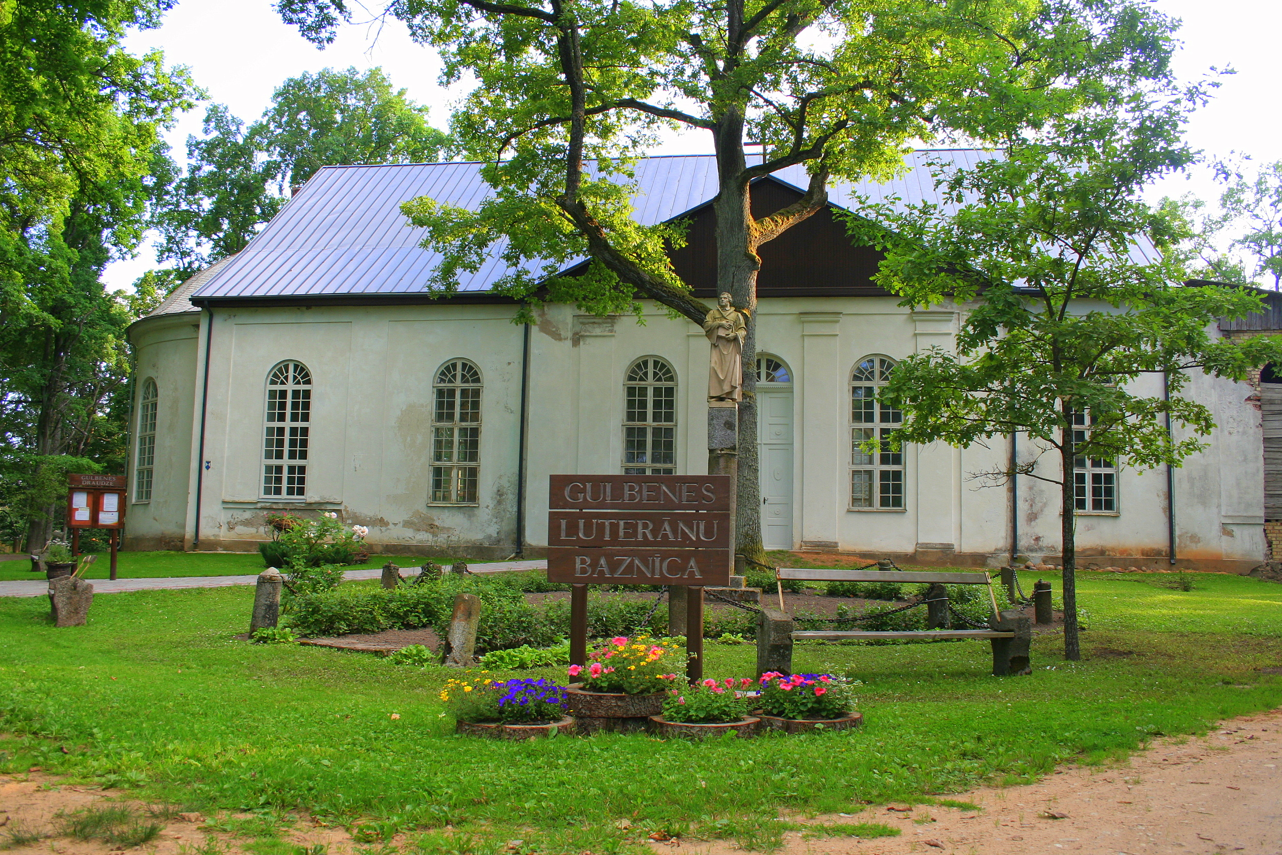 Vecgulbenes luterāņu baznīca, Gulbene, Brīvības iela 13